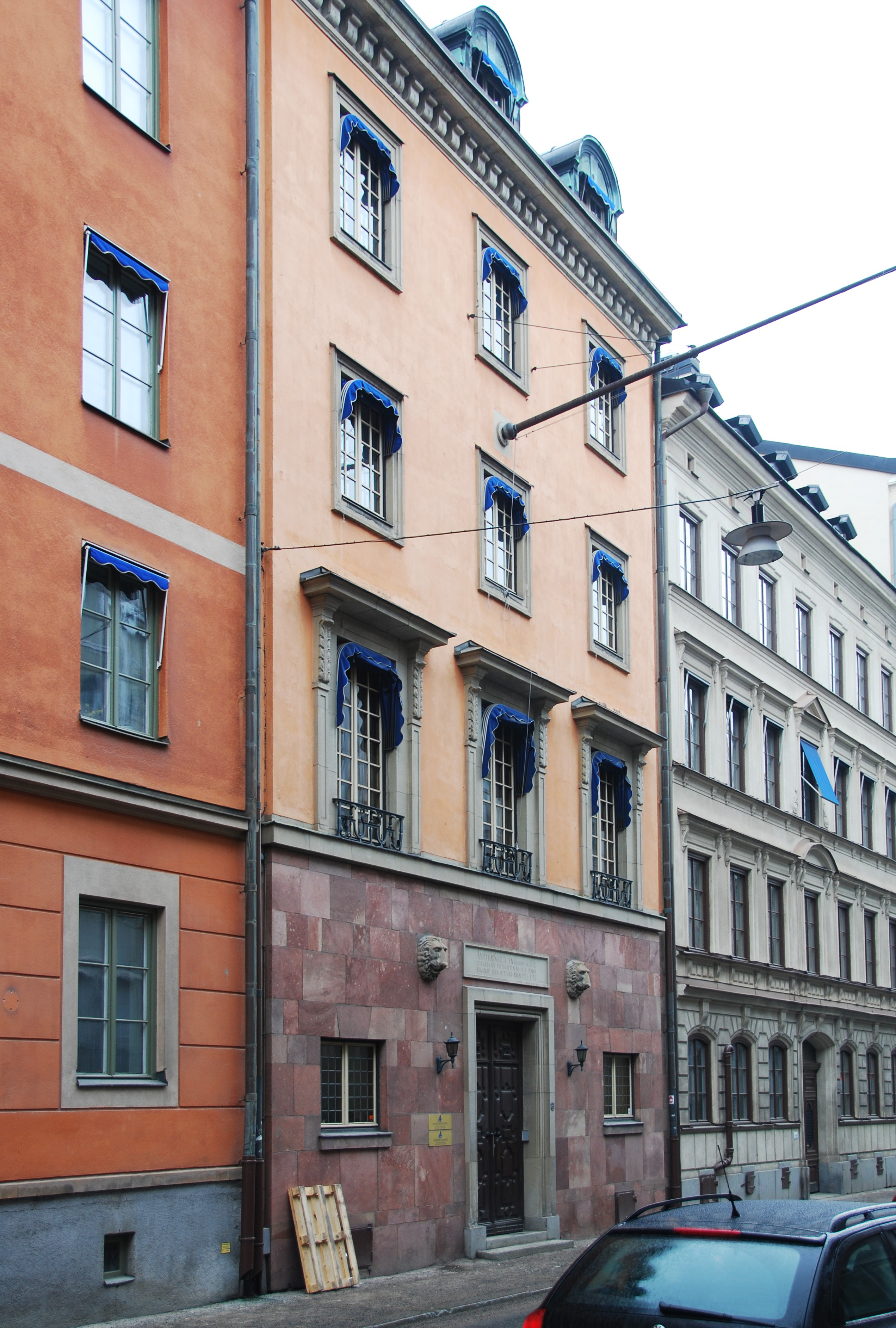 Wallingatan 26. Apotekarsocietetens hus. Byggnadsår 1924-25, arkitekt Peder Clason, byggherre Apotekarsocieteten, byggmästare I B Persson och G Wahlström